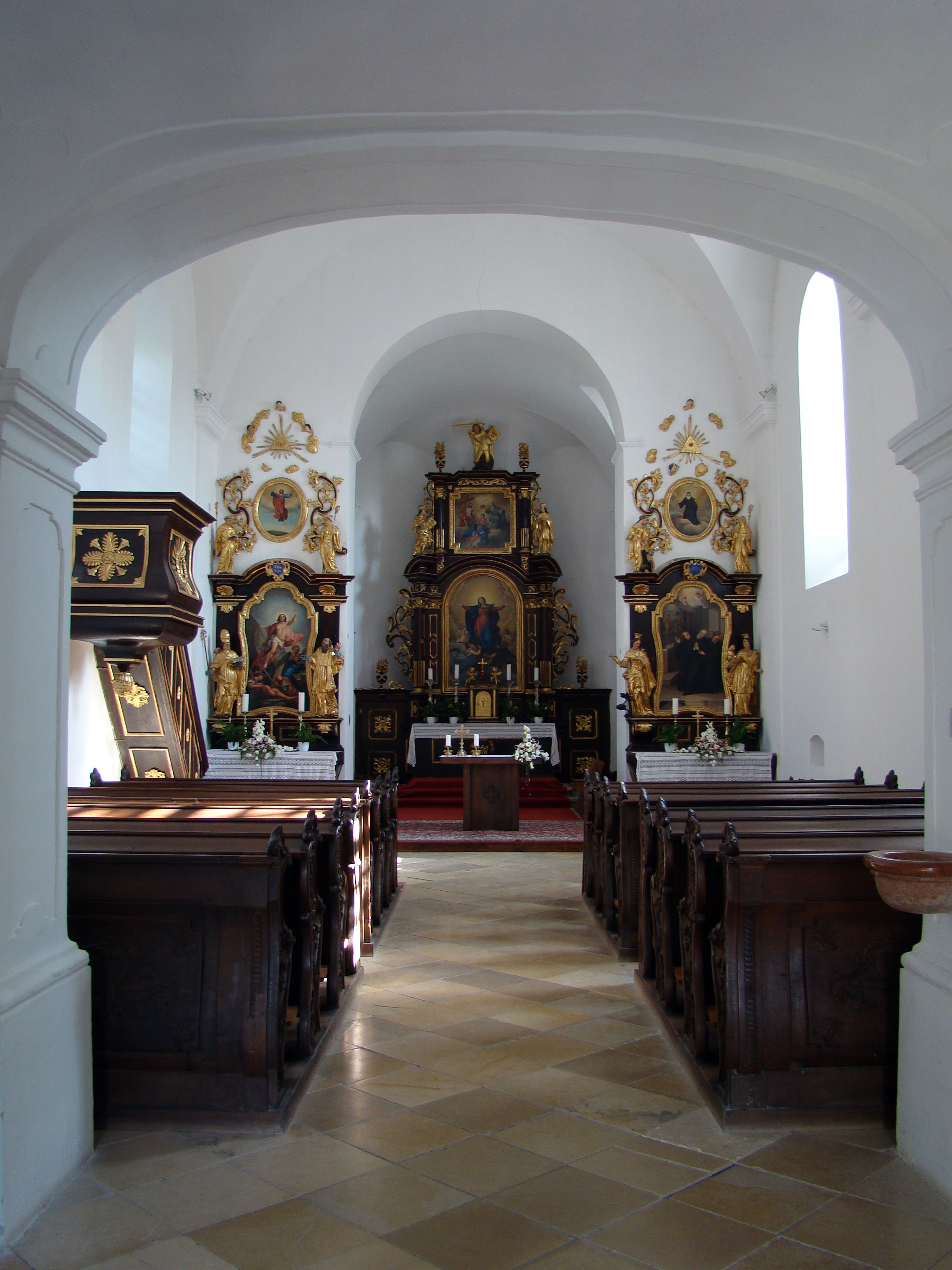 Pannonhalma, Boldogasszony-kápolna